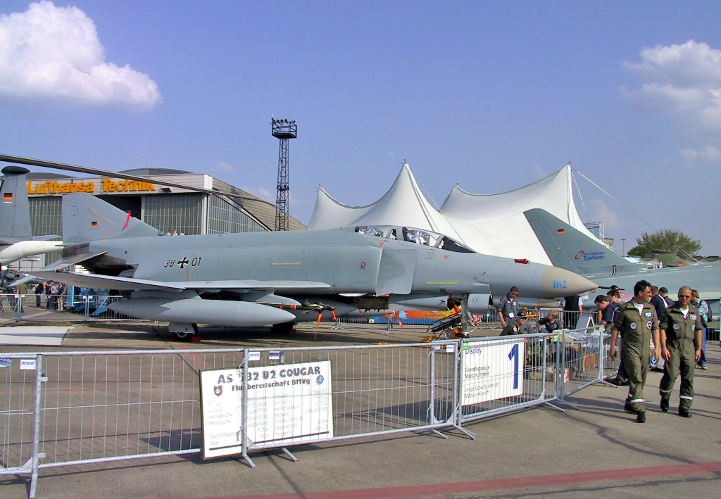 Eine McDonnell F-4 Phantom II der deutschen Luftwaffe auf der ILA 2002.